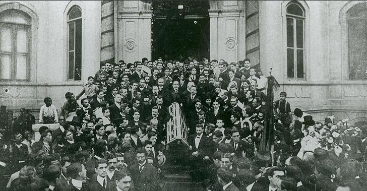 Enterro do escritor Machado de Assis em 1908